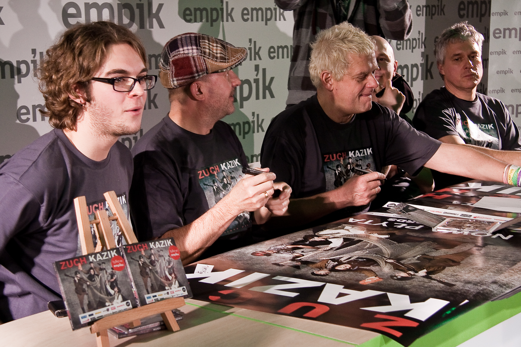 Zespół Zuch Kazik w czasie podpisywania płyty Zakażone piosenki